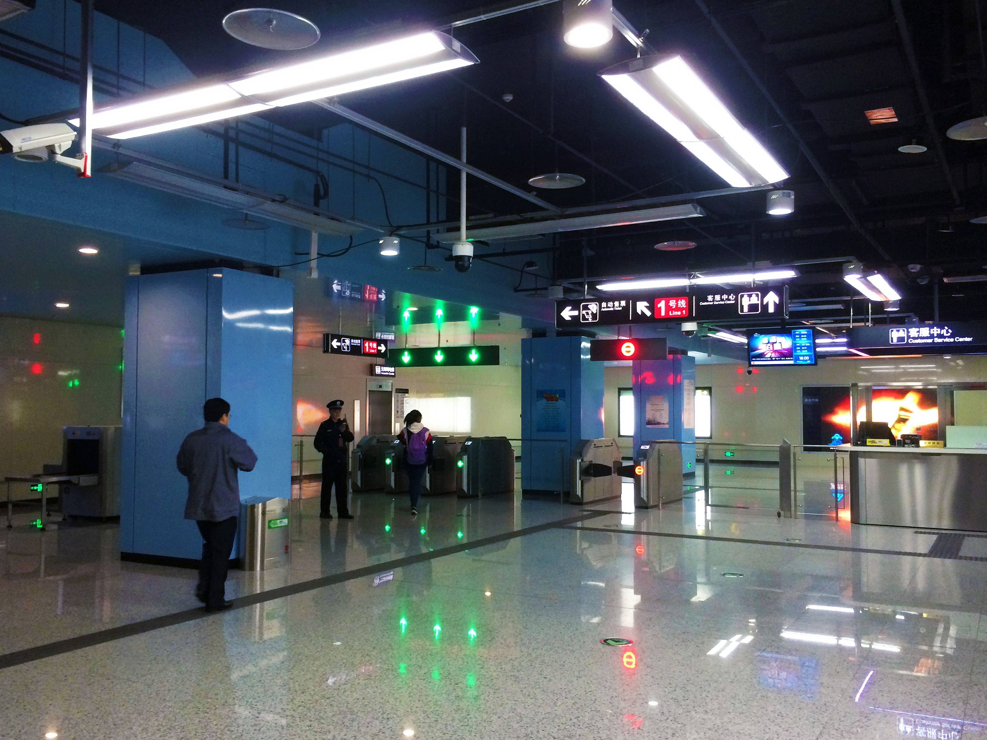 無錫地鐵談渡橋站站廳，該站全站爲無吊頂設計。